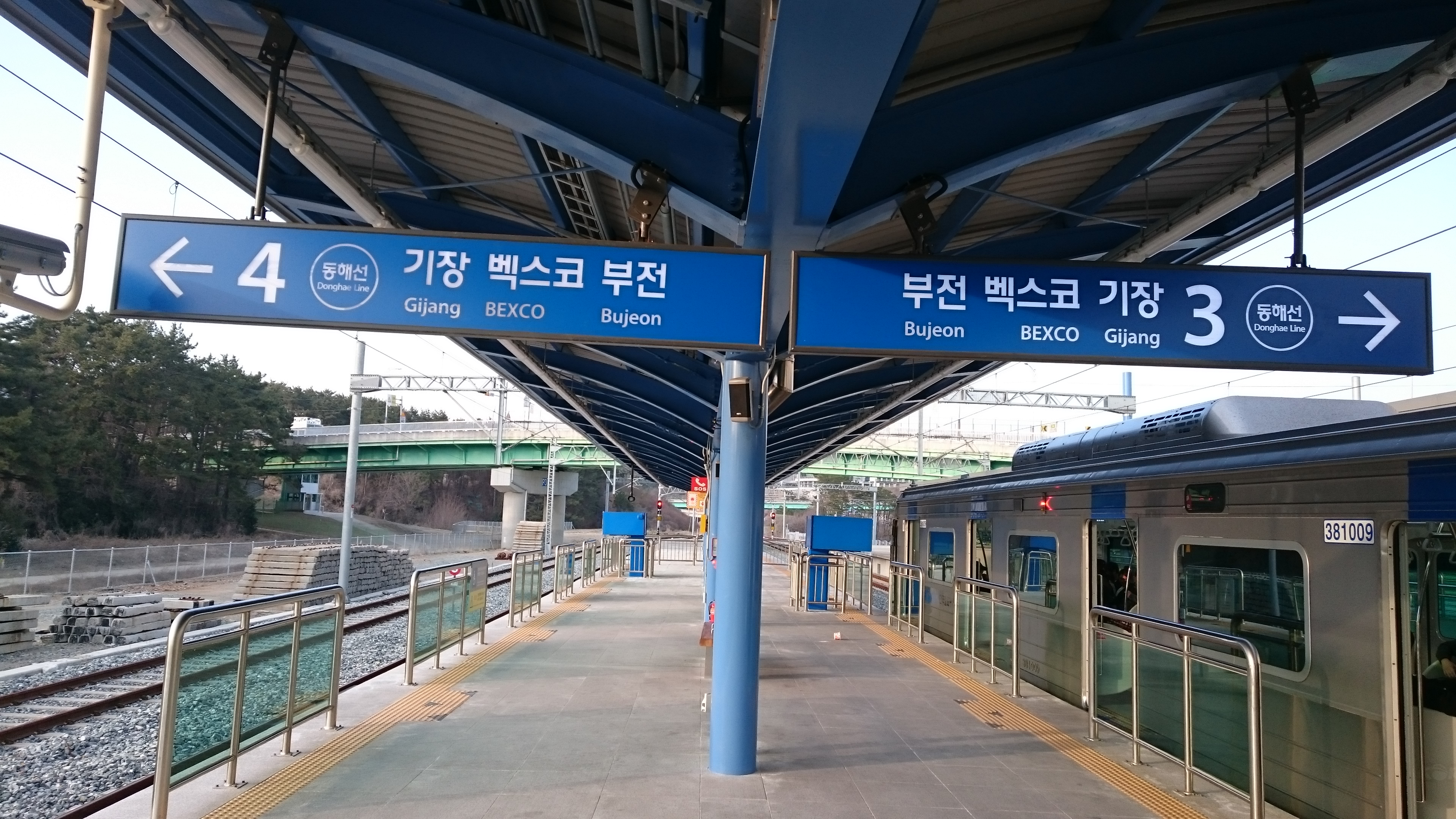 東海線日光駅プラットフォーム。